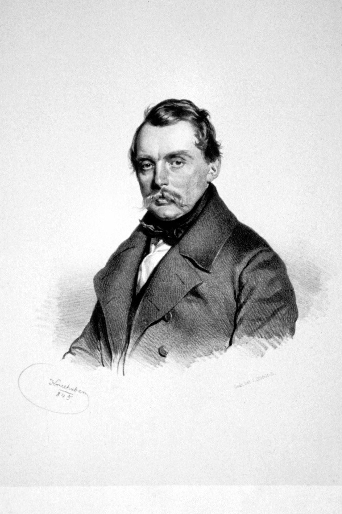 Ludwig III. (1806-1877), Großherzog von Hessen-Darmstadt. Lithographie von Josef Kriehuber, 1845